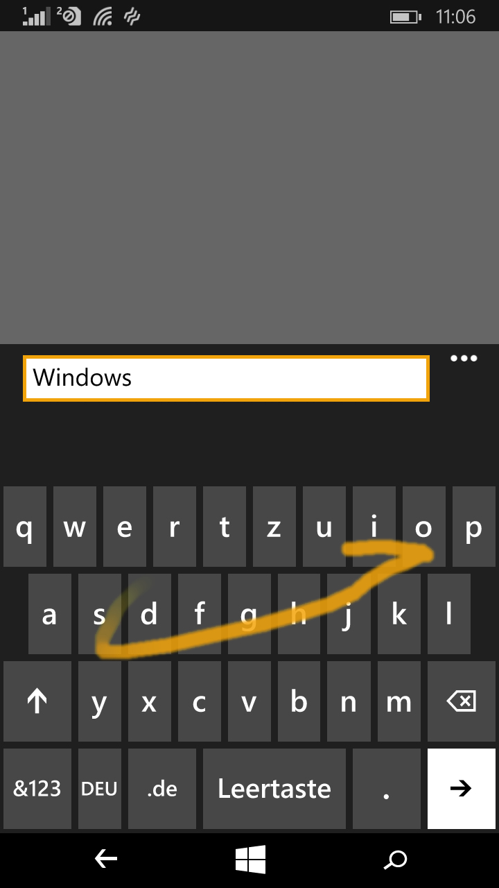 Wörter können ab Windows Phone 8.1 über Wischgesten eingegeben werden.